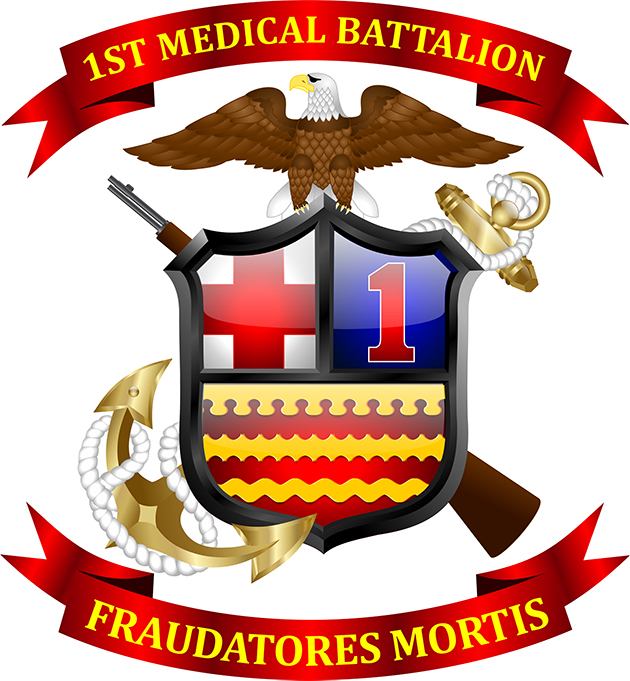 1st Medical battalion